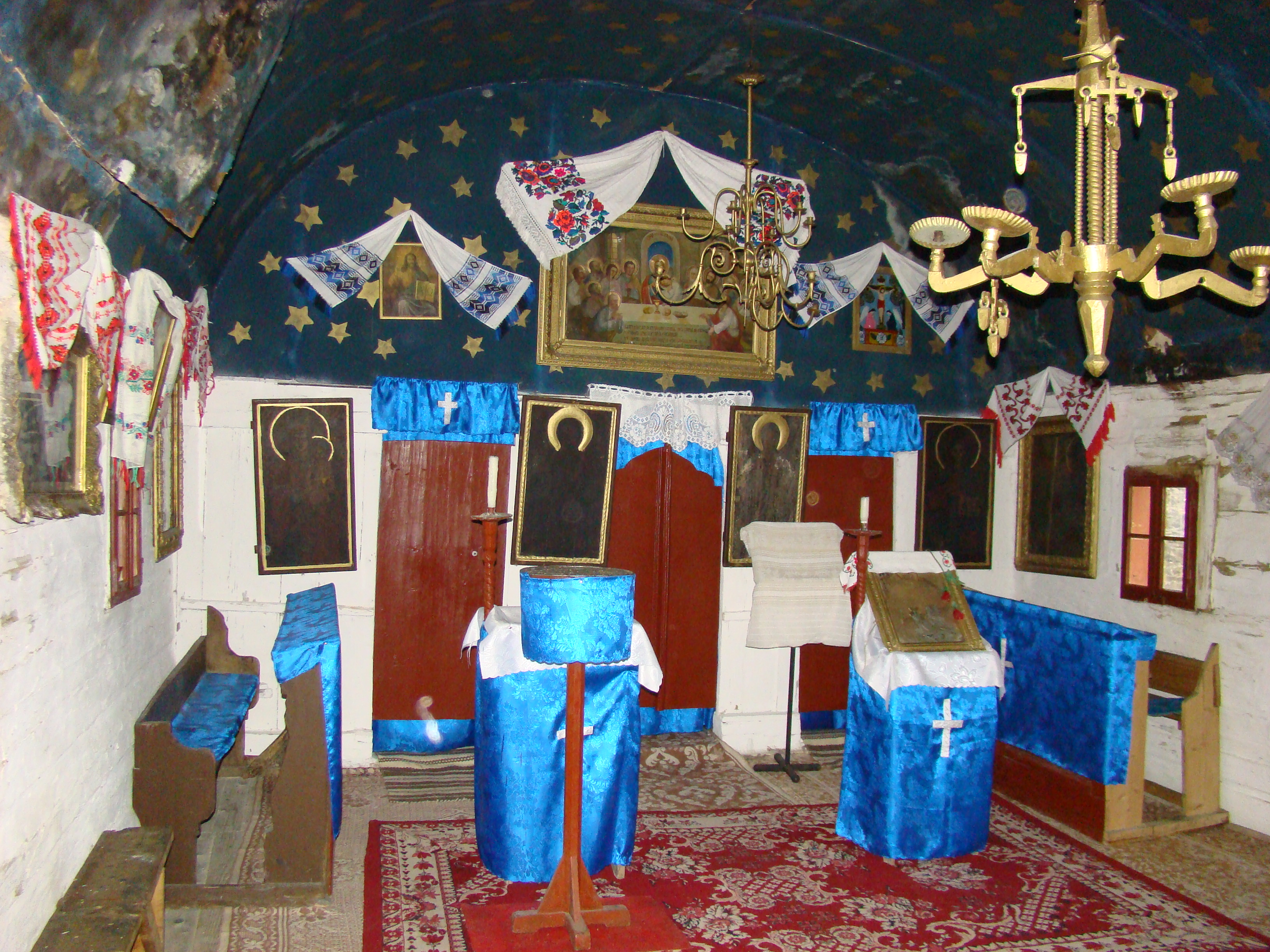 Biserica de lemn „Sf.Arhangheli” din Mădărășeni, județul Mureș